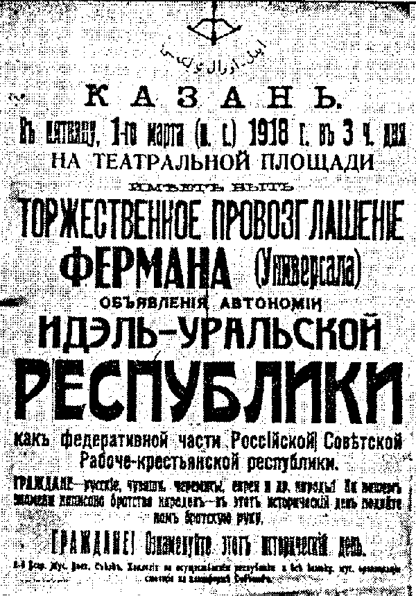 afbeelding meer dan 70 jaar oud en toestemming van website [1]